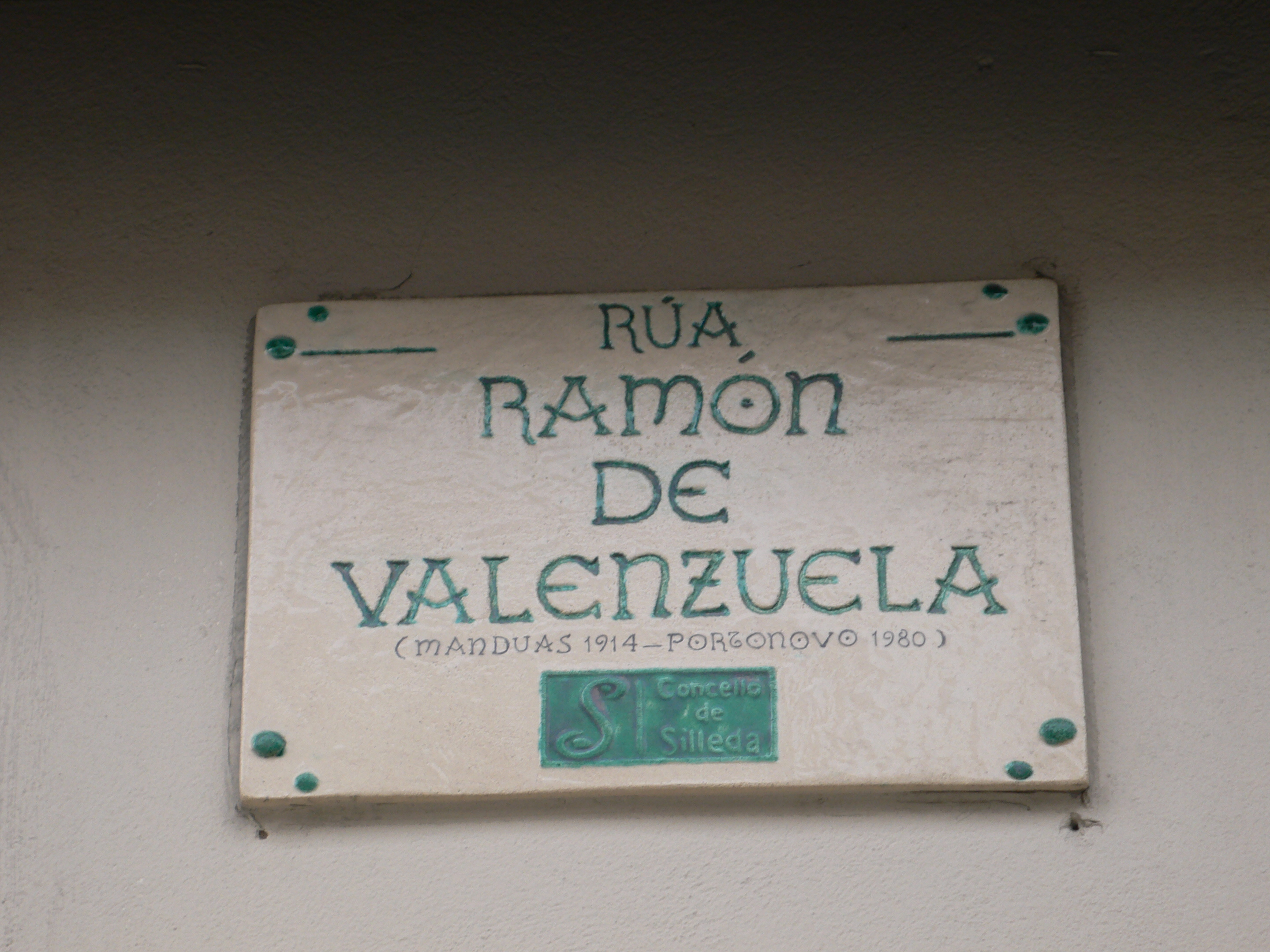 Placa da rúa Ramón de Valenzuela na Bandeira, Silleda